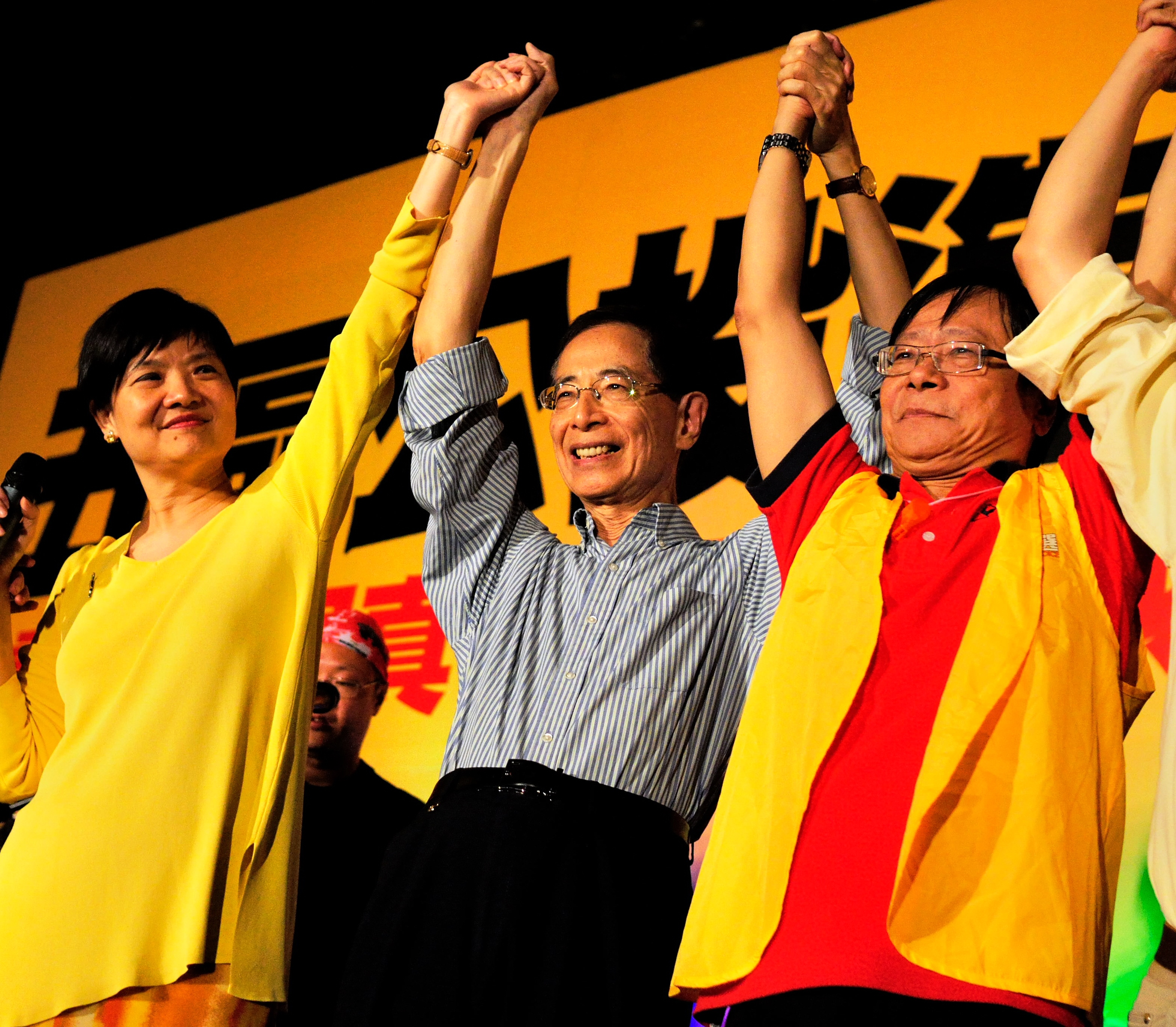 中文（香港）: 余若薇、李柱銘和黃毓民等香港立法會議員在2010年五區公投爭取真普選大會